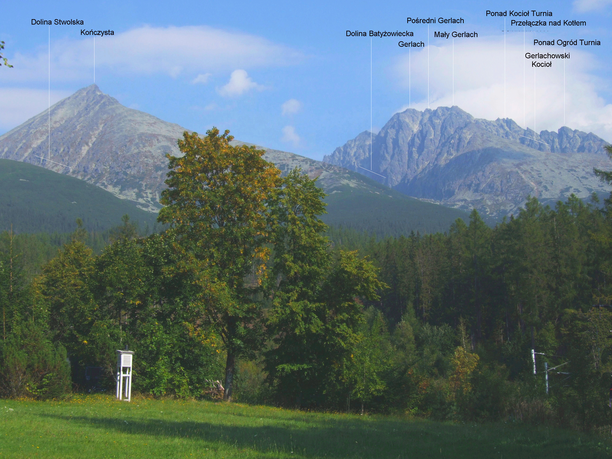 Widok na Dolinę Stwolska i Batyzowiecką z Wyżnych Hag